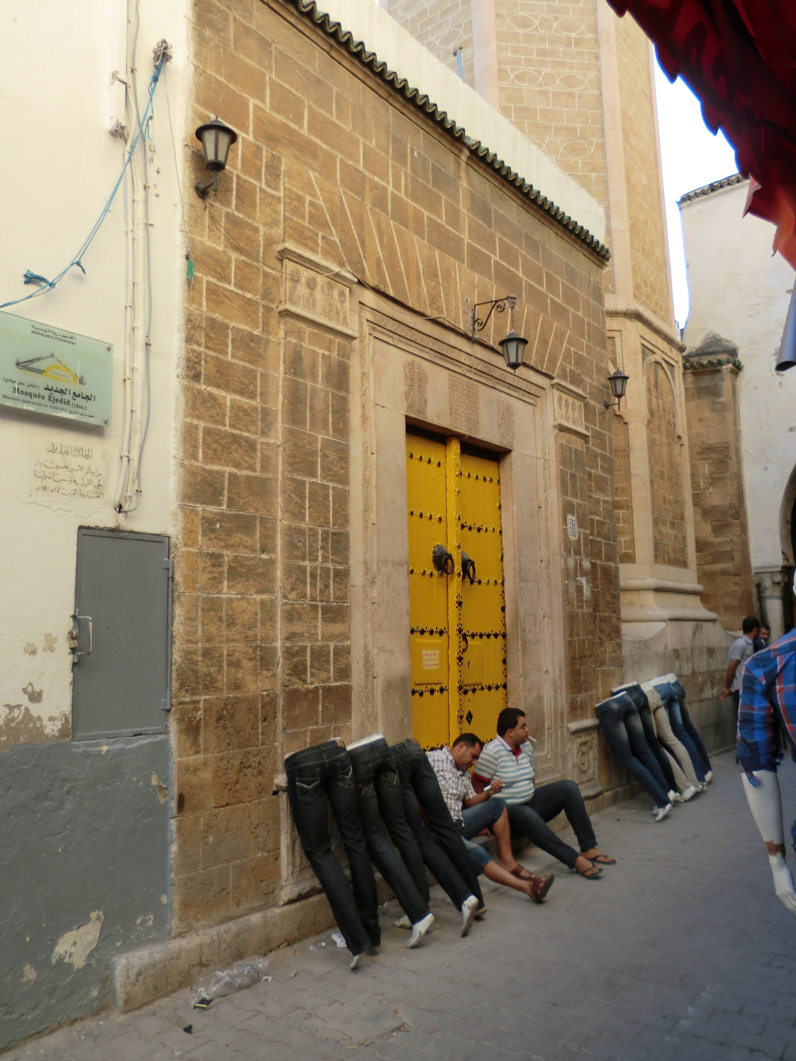 Mosquée Djamâa-Djedid, Tunis